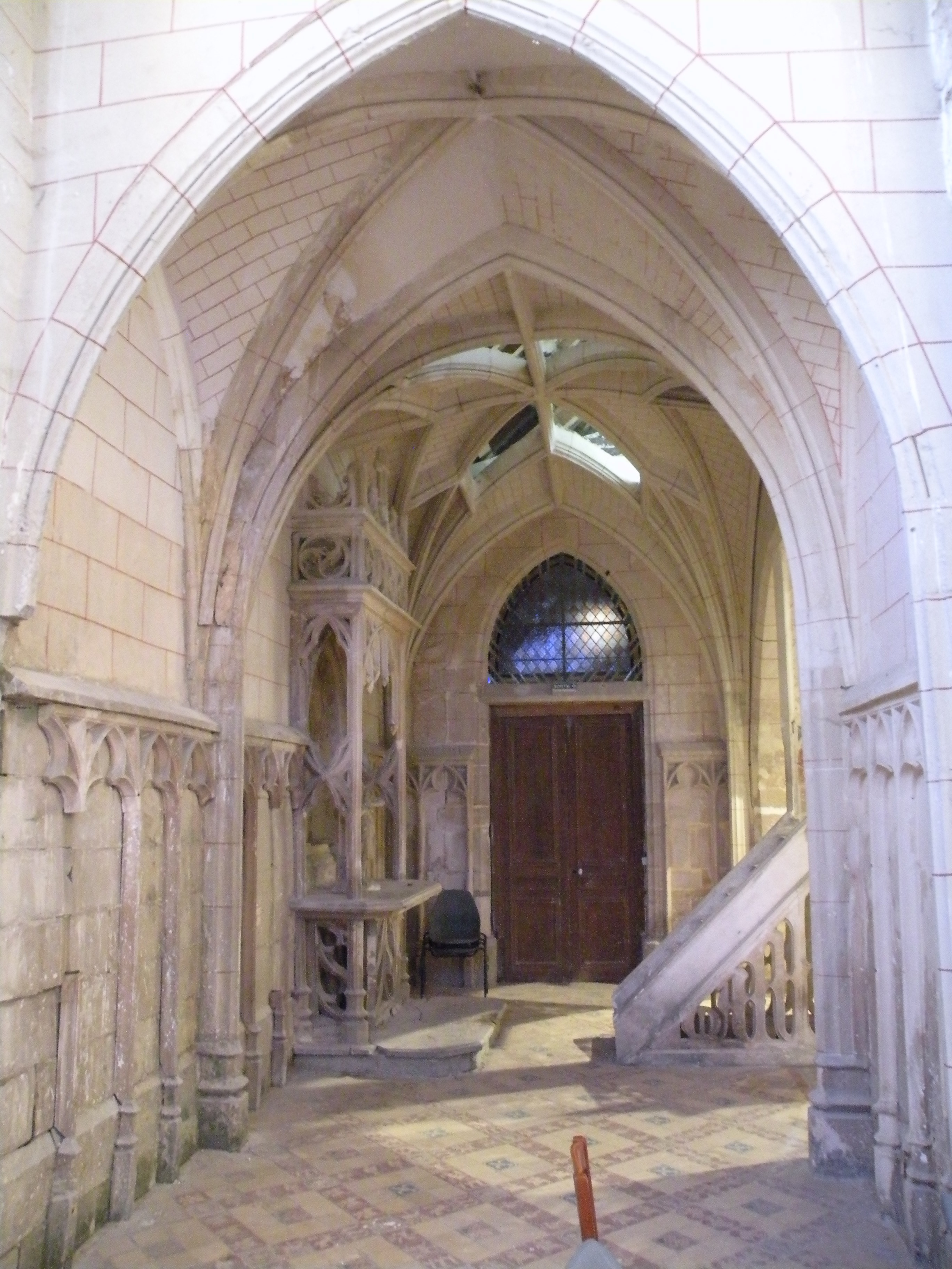 Bas-côté sud, vue vers l'ouest ; autel latéral et escalier de la chaire.